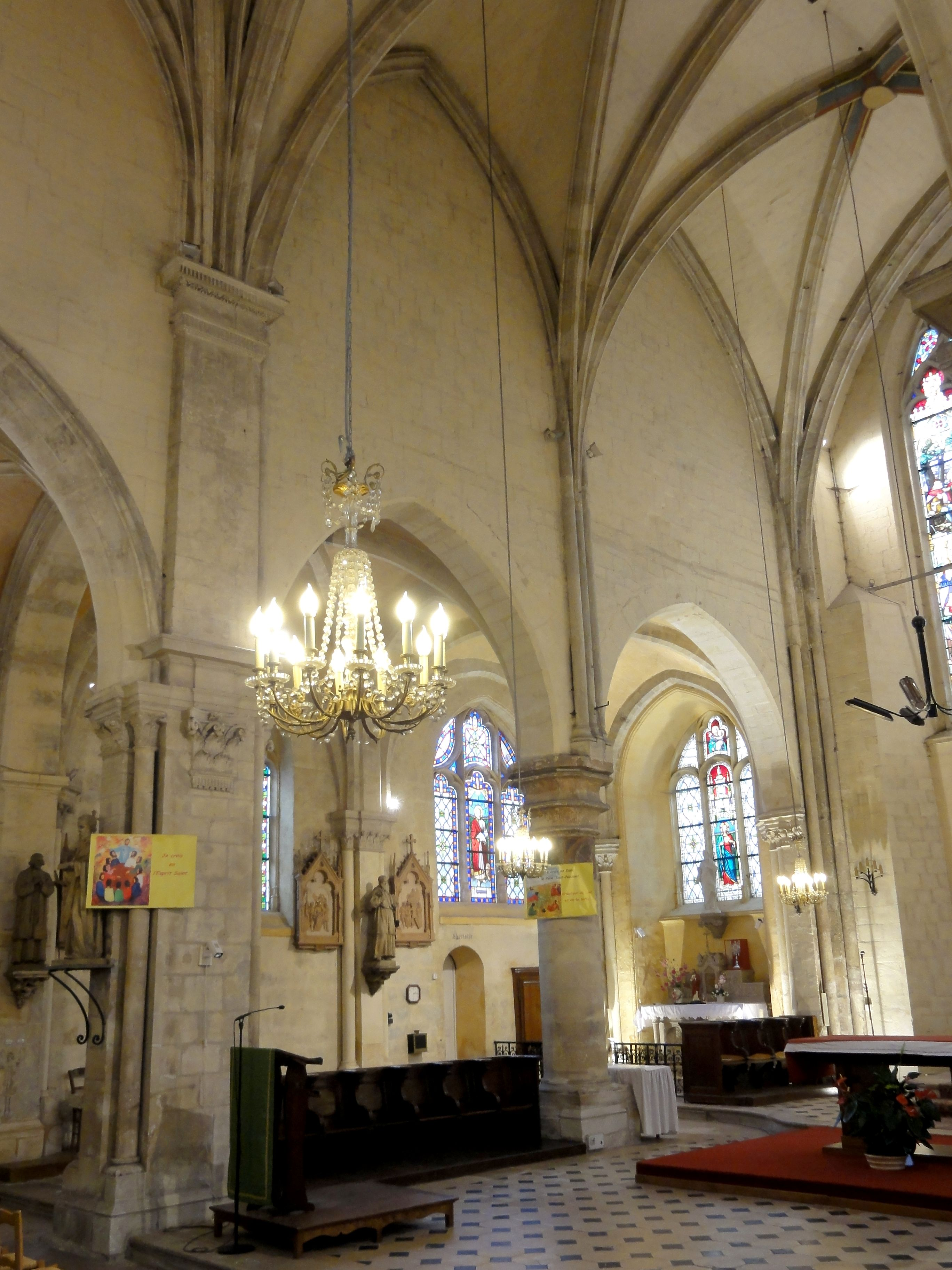 4e et 5e travée côté nord.